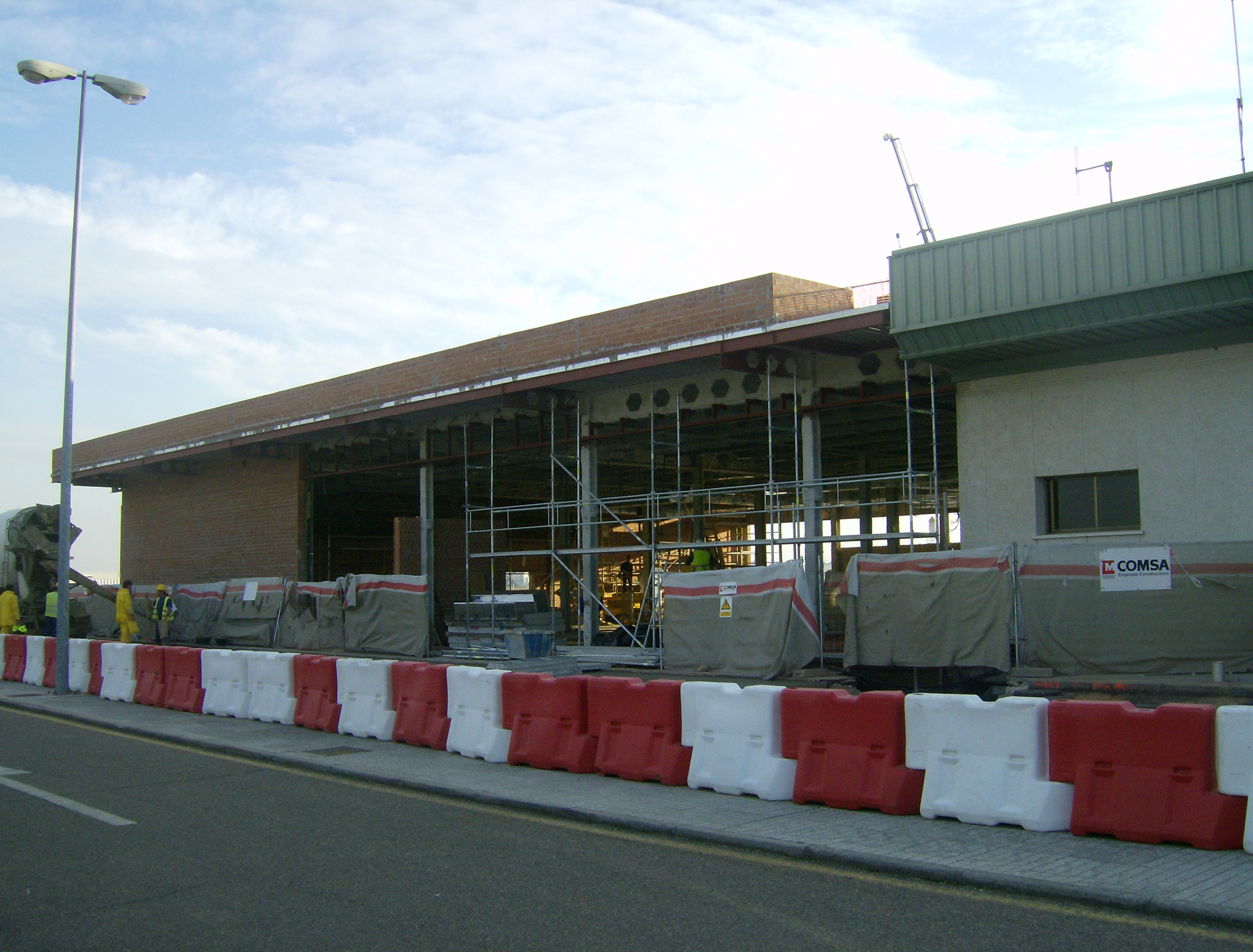 Foto de la ampliación de la terminal del Aeropuerto de Badajoz